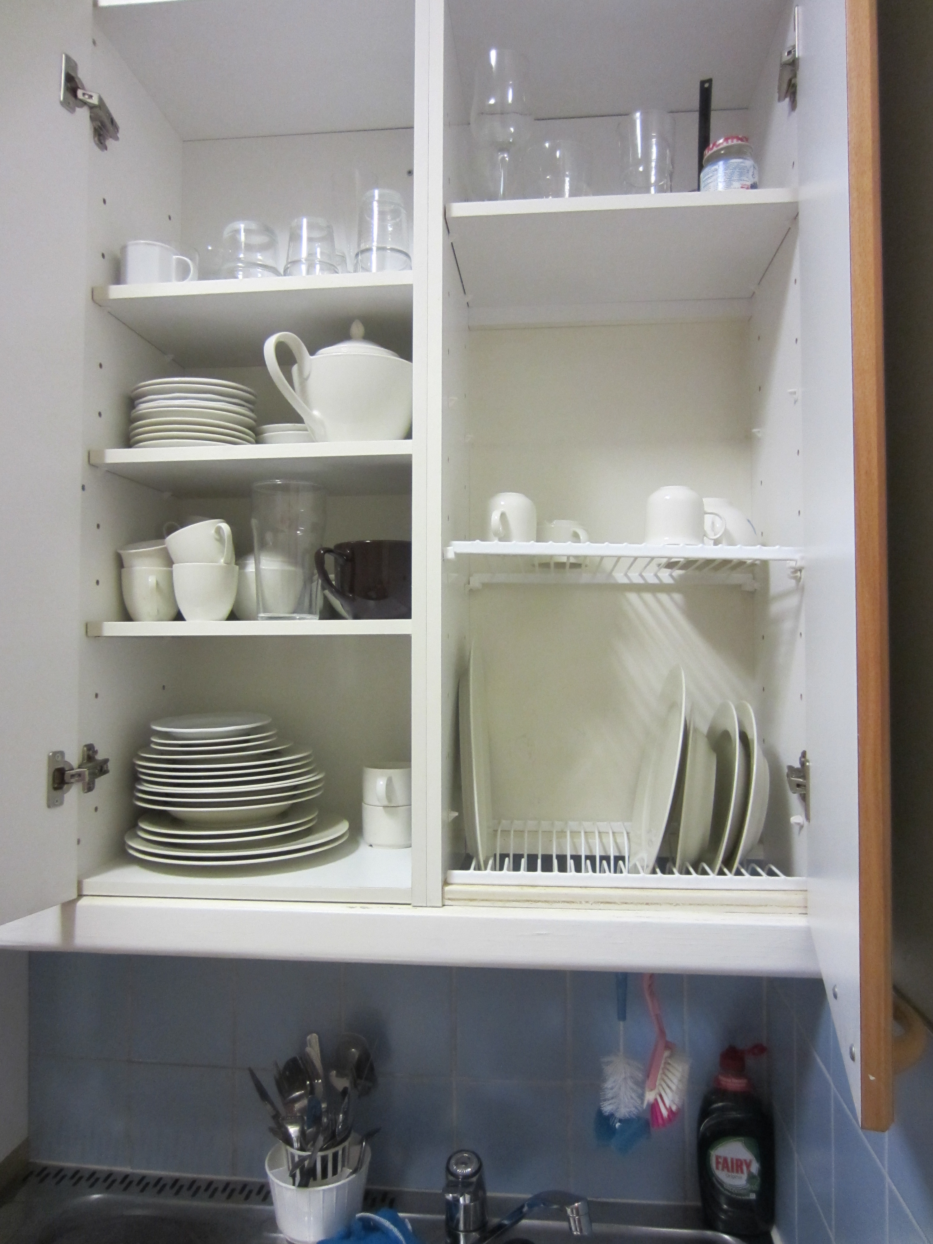 Finskt diskställ inbyggt i köksskåp i Villa Kivis strandbyggnad 1 sept14